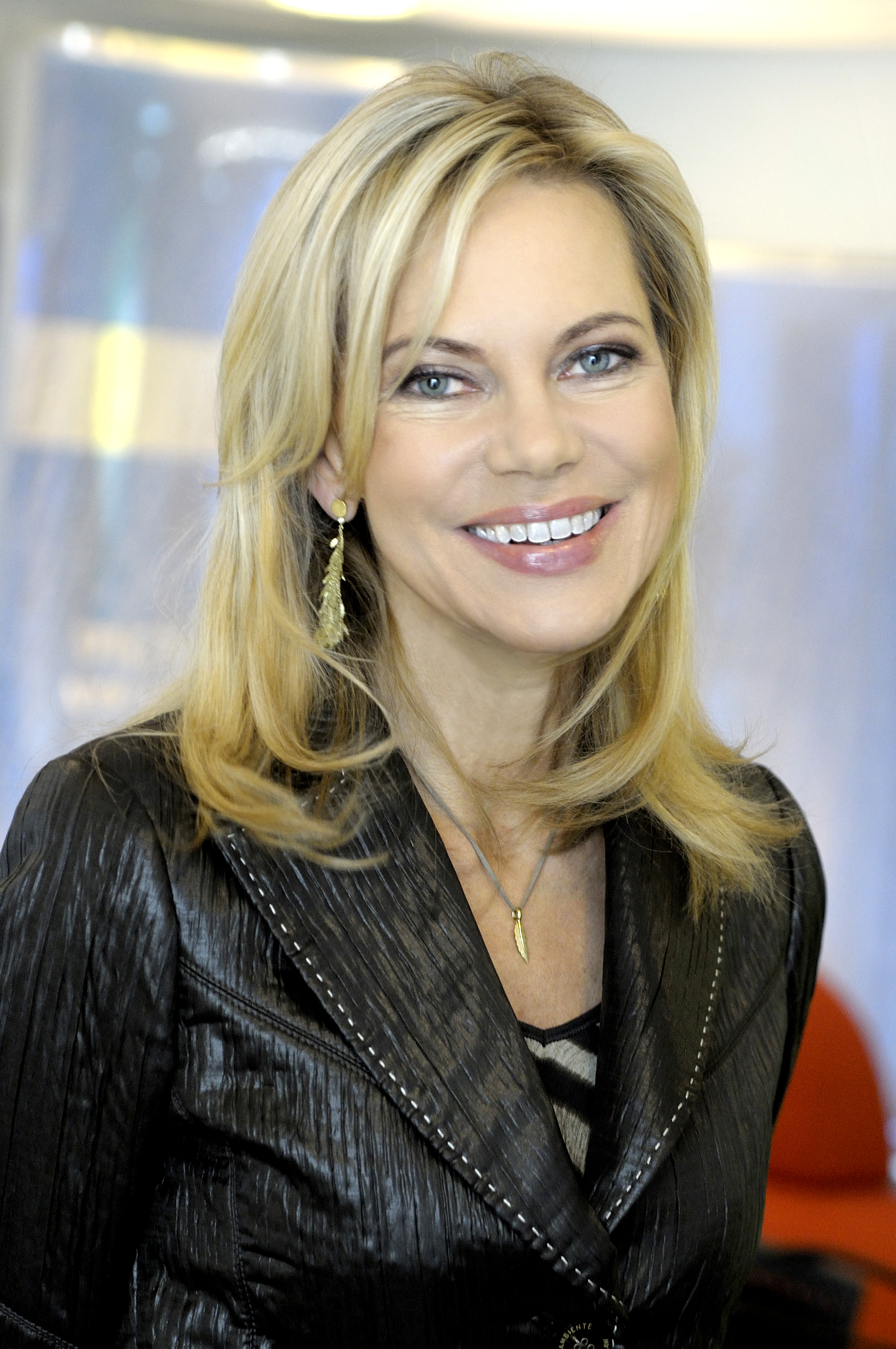 Die Moderatorin Nina Ruge 2013